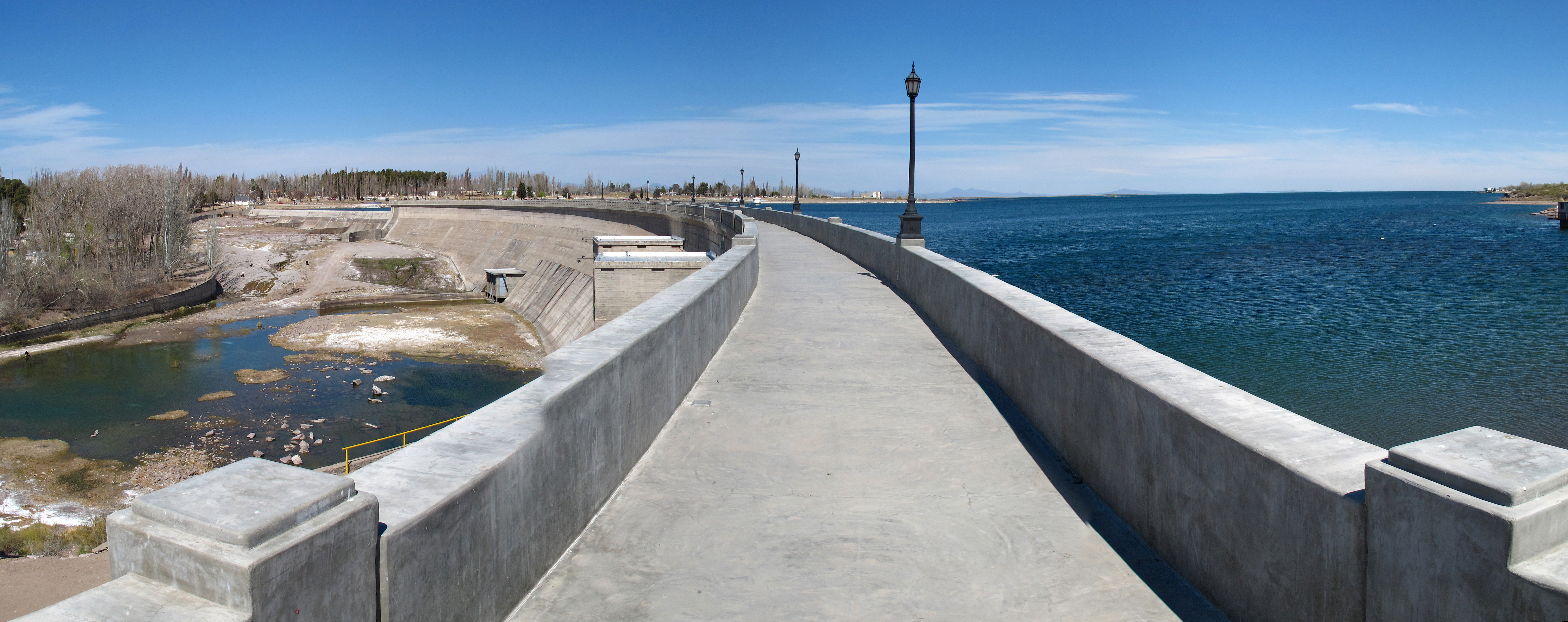 Dique El Nihuil en la provincia de Mendoza (Argentina)